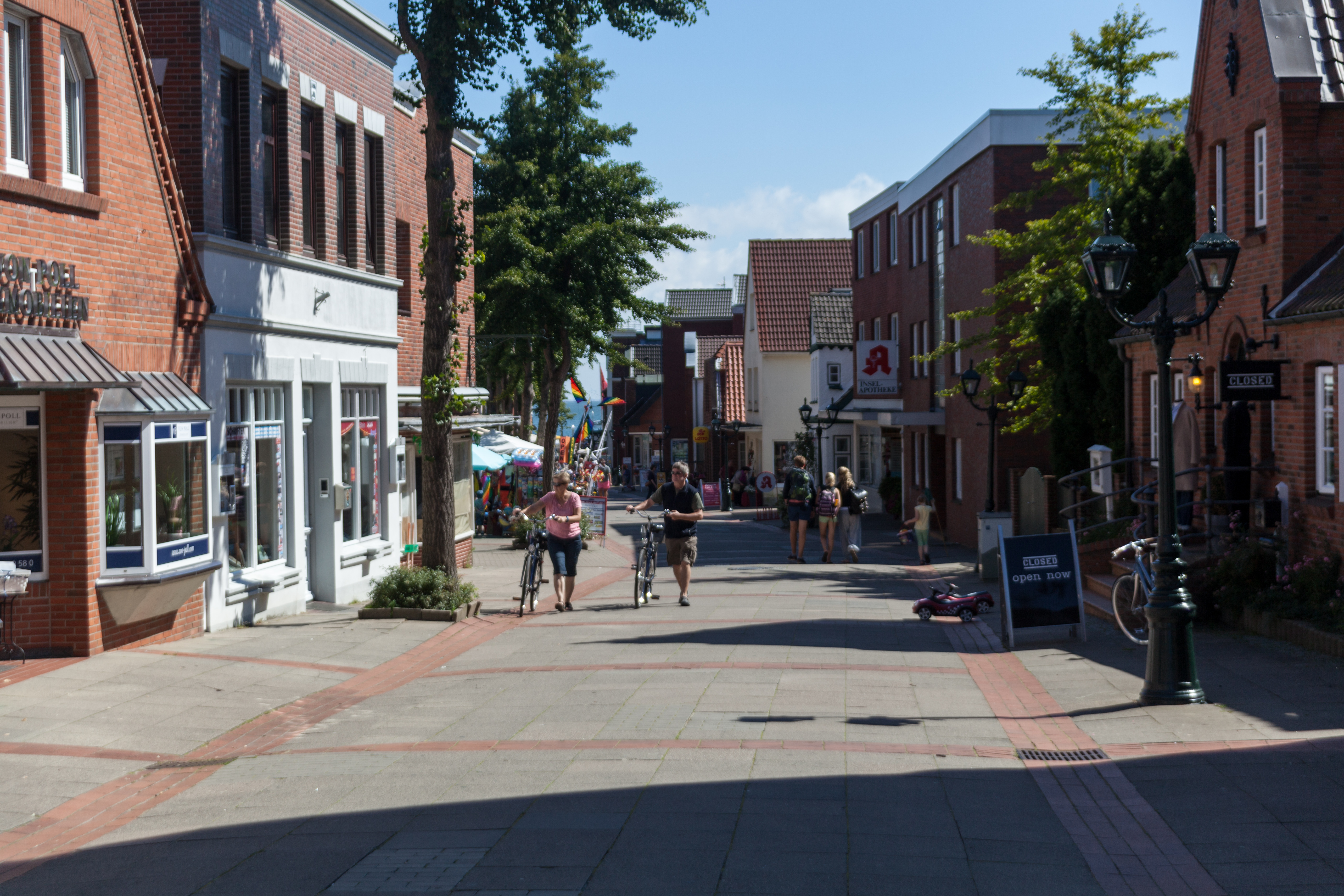 Wyk